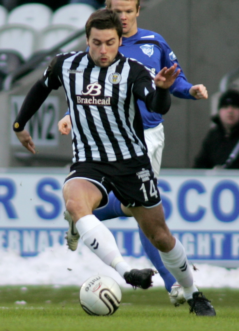 St Mirren vs Peterhead